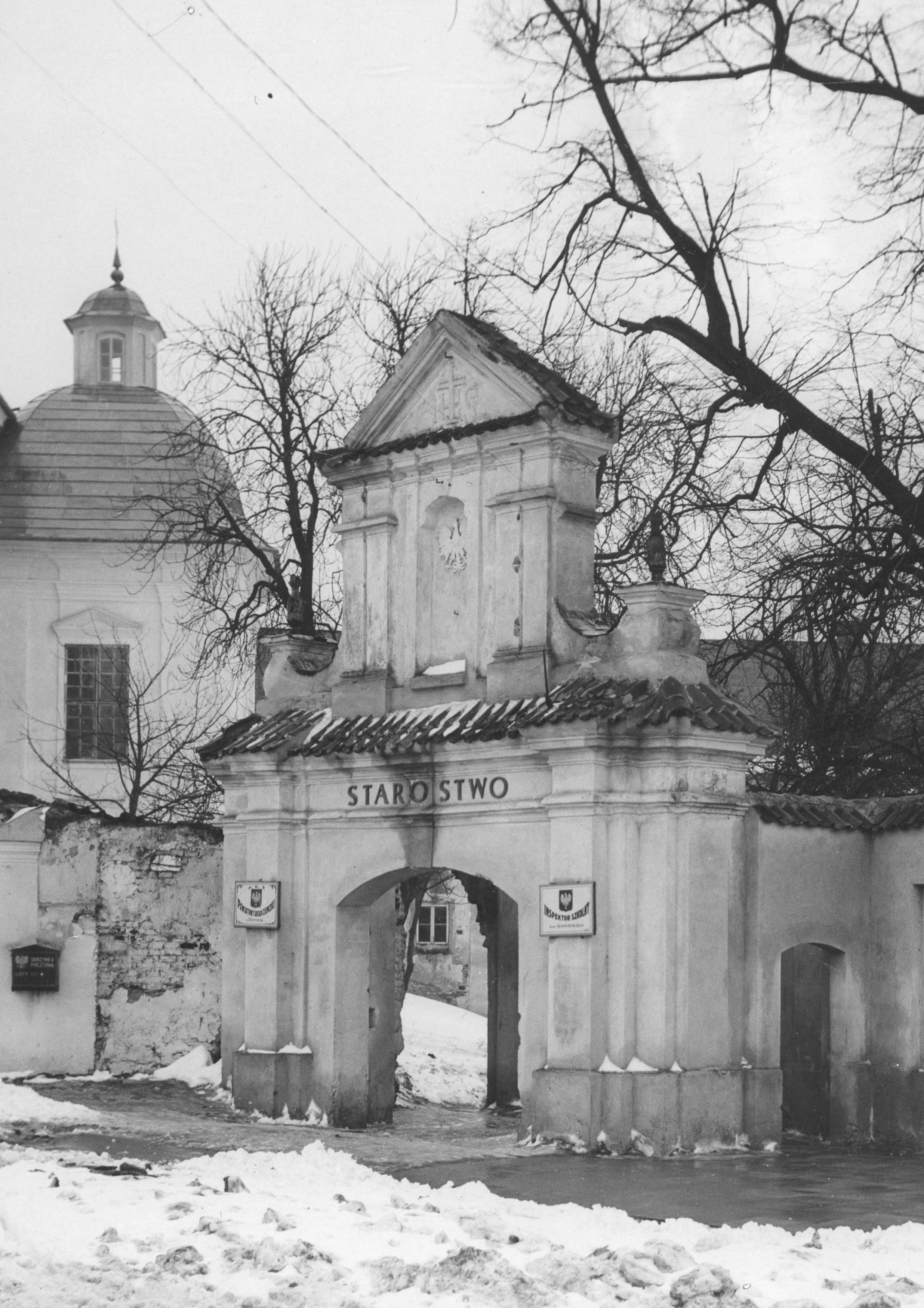 Беларуская (тарашкевіца): Слонім (Słonim), вуліца Бэрнардынская (vulica Bernardynskaja). Касьцёл Найсьвяцейшай Тройцы і кляштар бэрнардынаў, брама